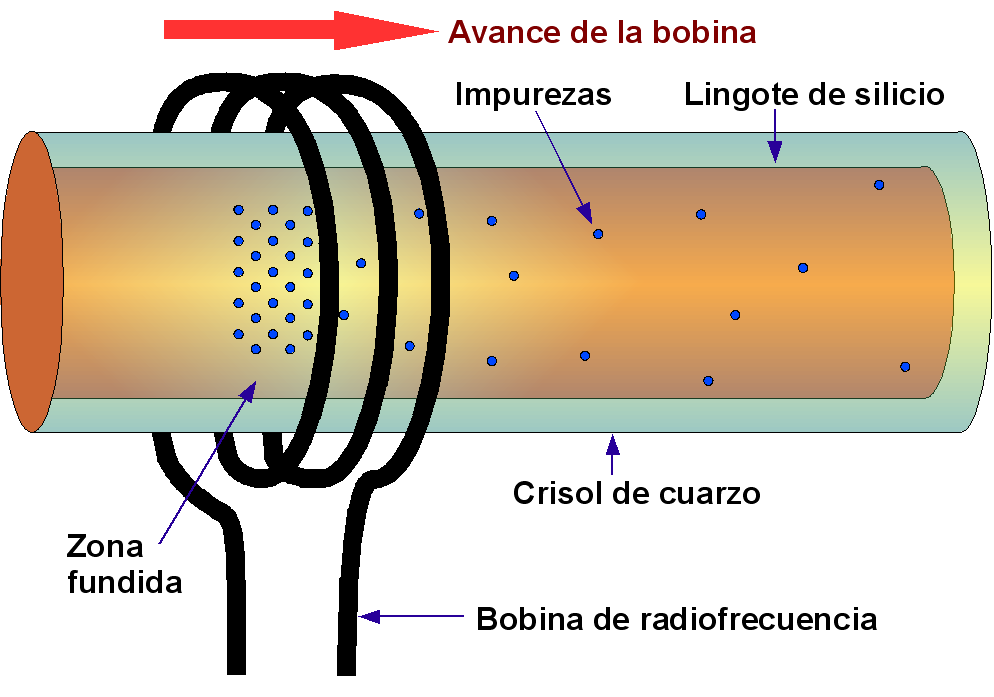 Crisol para fusíón por zonas